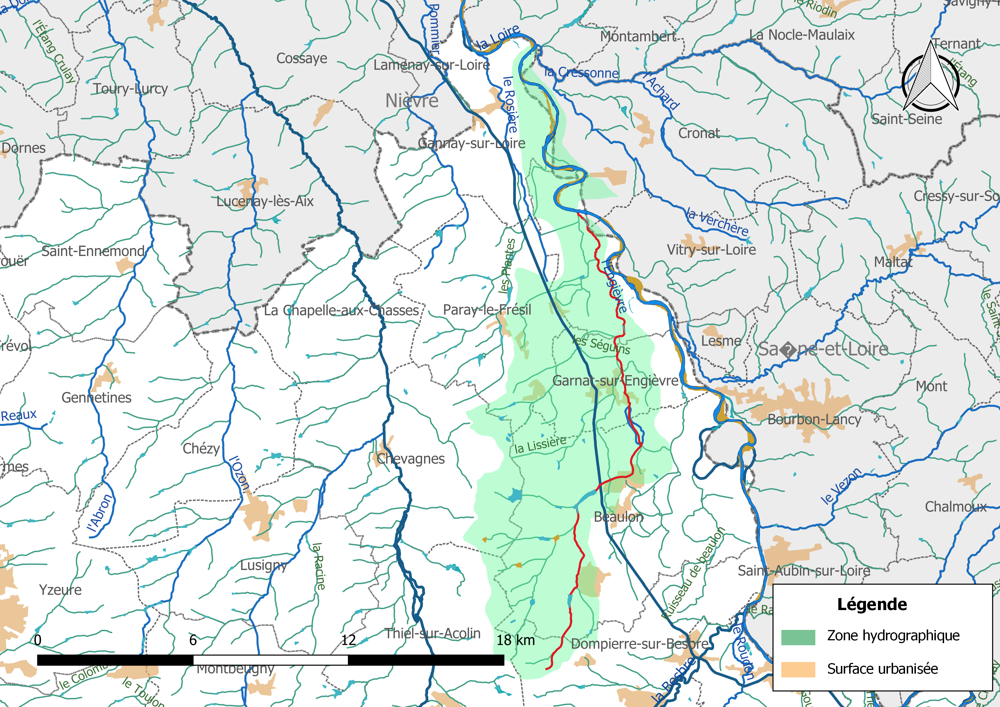 Carte du cours d'eau « l'Engièvre » (France) et de la zone hydrographique dans laquelle il s'insère.